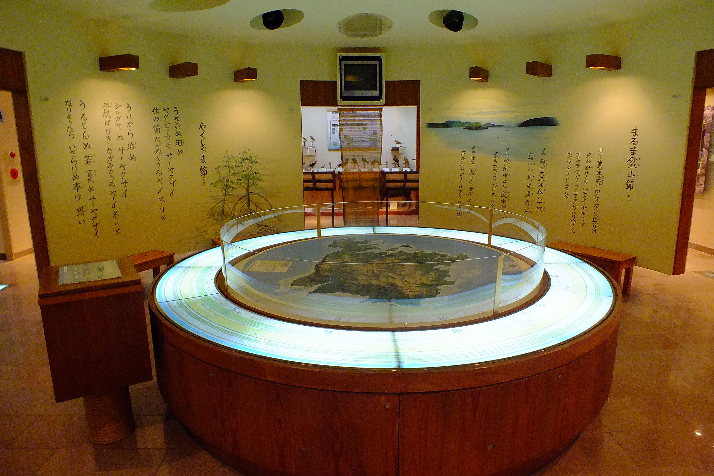 2017-01-29 Iriomote-yasei-hogo-center 西表野生生物保護センター